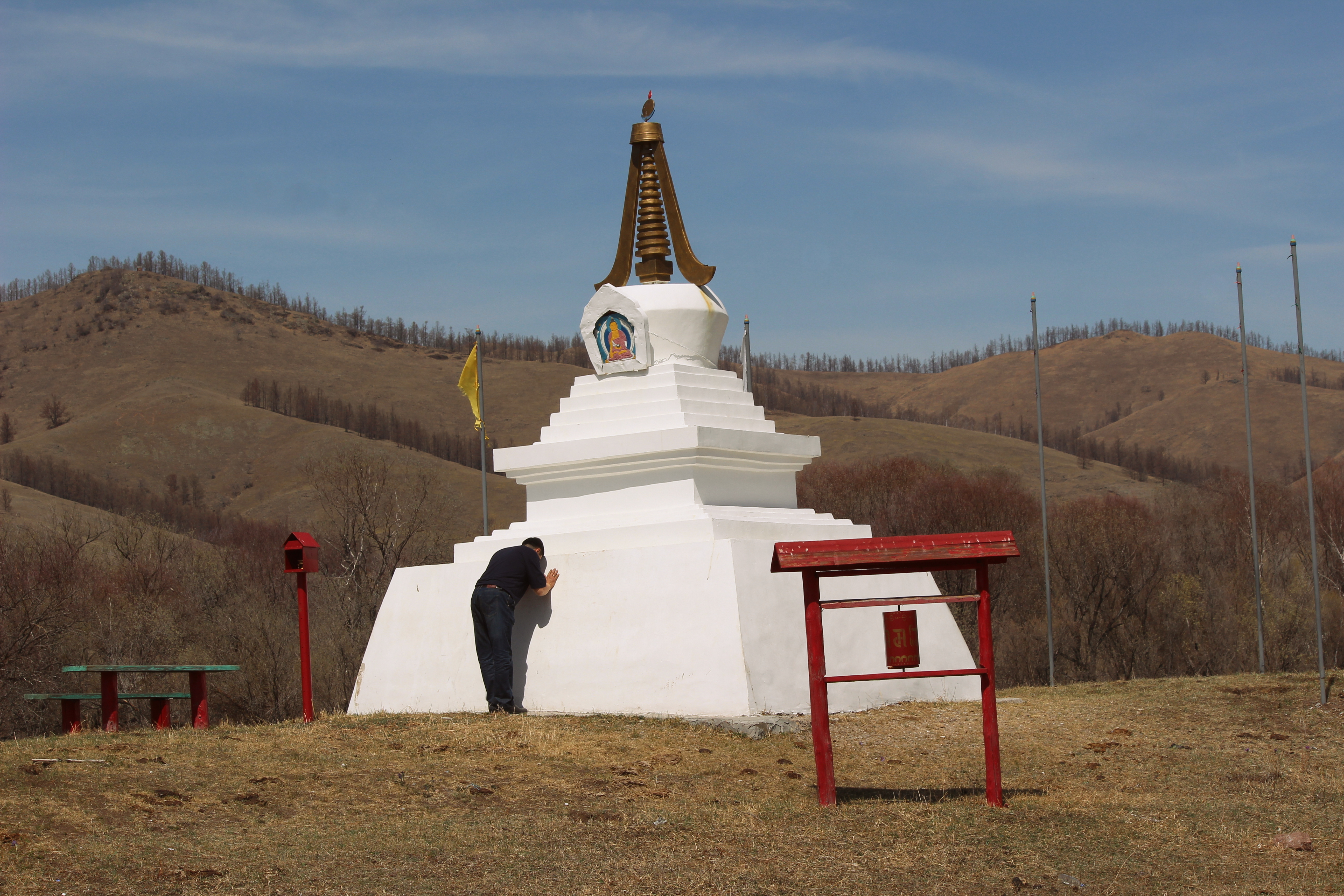 Буддийская ступа - субурган - на въезде в село Армак, Джидинский район, Бурятия, Восточная Сибирь.